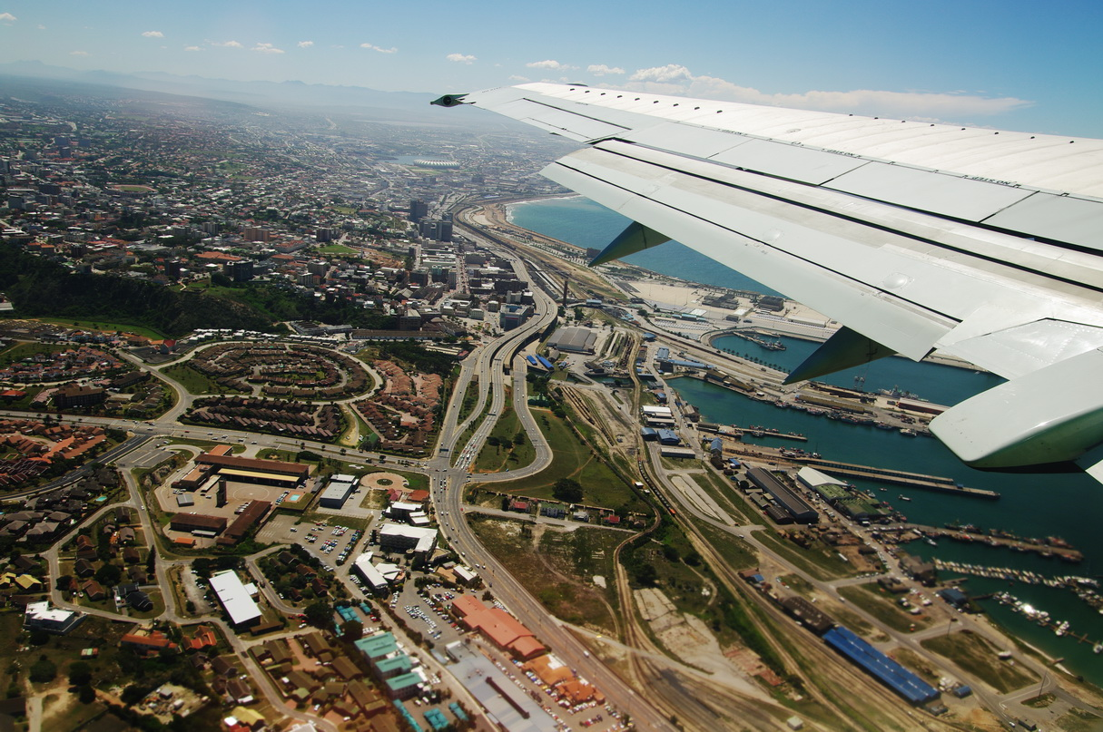 Hafen von PE aus der Luft